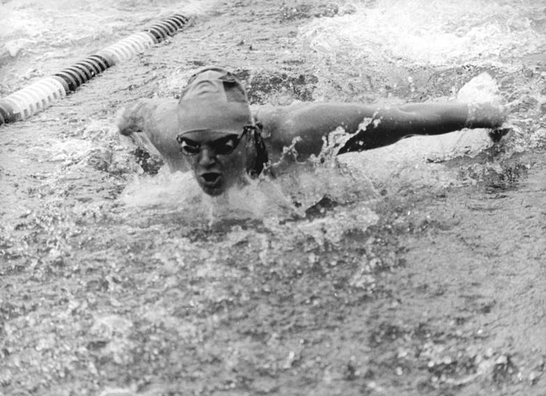 Andrea Pollack ADN-ZB Kluge 11.8.79 Utrecht-Schwimm-Europapapokal der Damen in Utrecht - Andrea Pollack (DDR) siegte am 11.8. über 100 m Schmetterling in 1.01,53 s. - Unser Foto zeigt sie bei einem früheren Wettkampf.